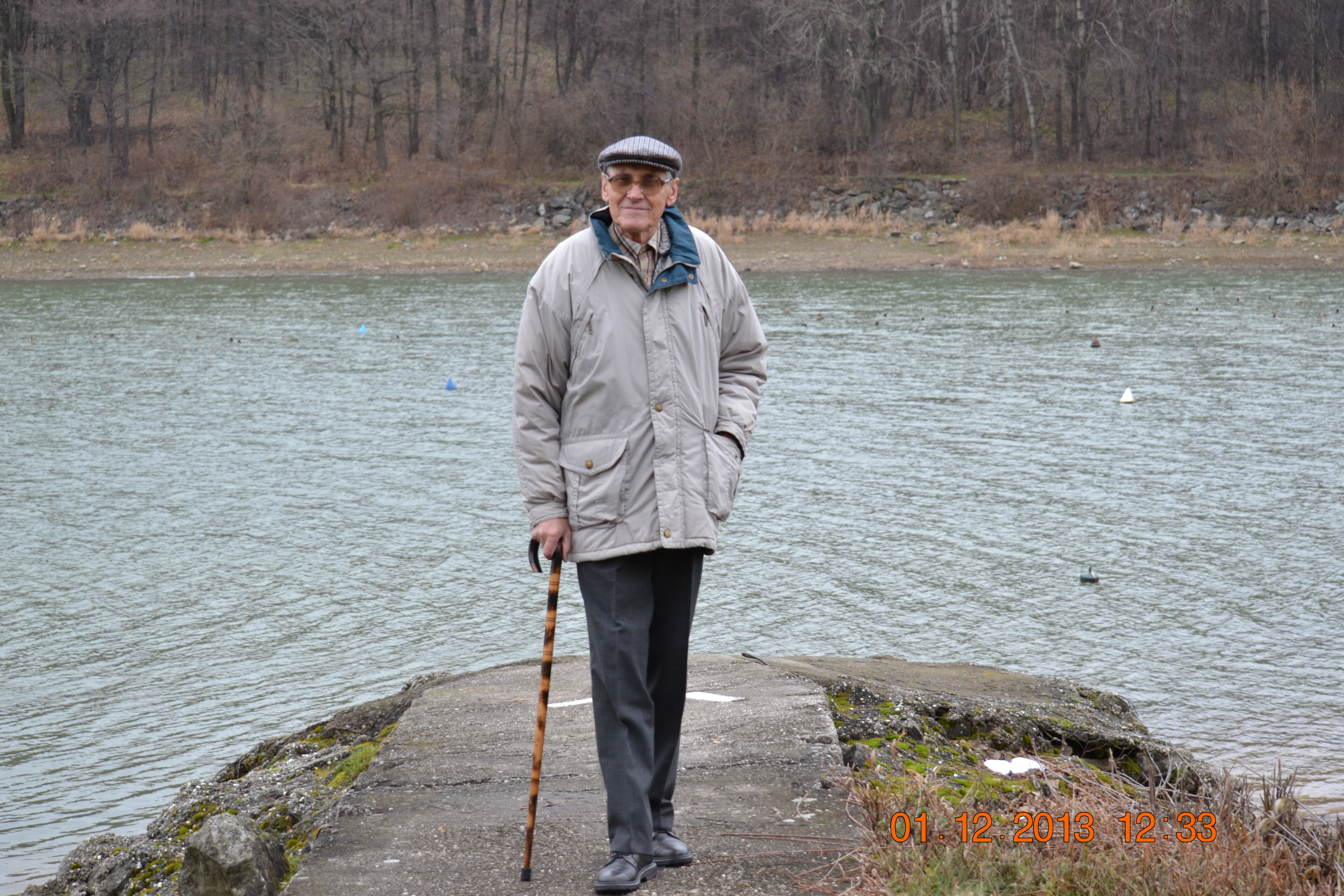 Józef Janoszek